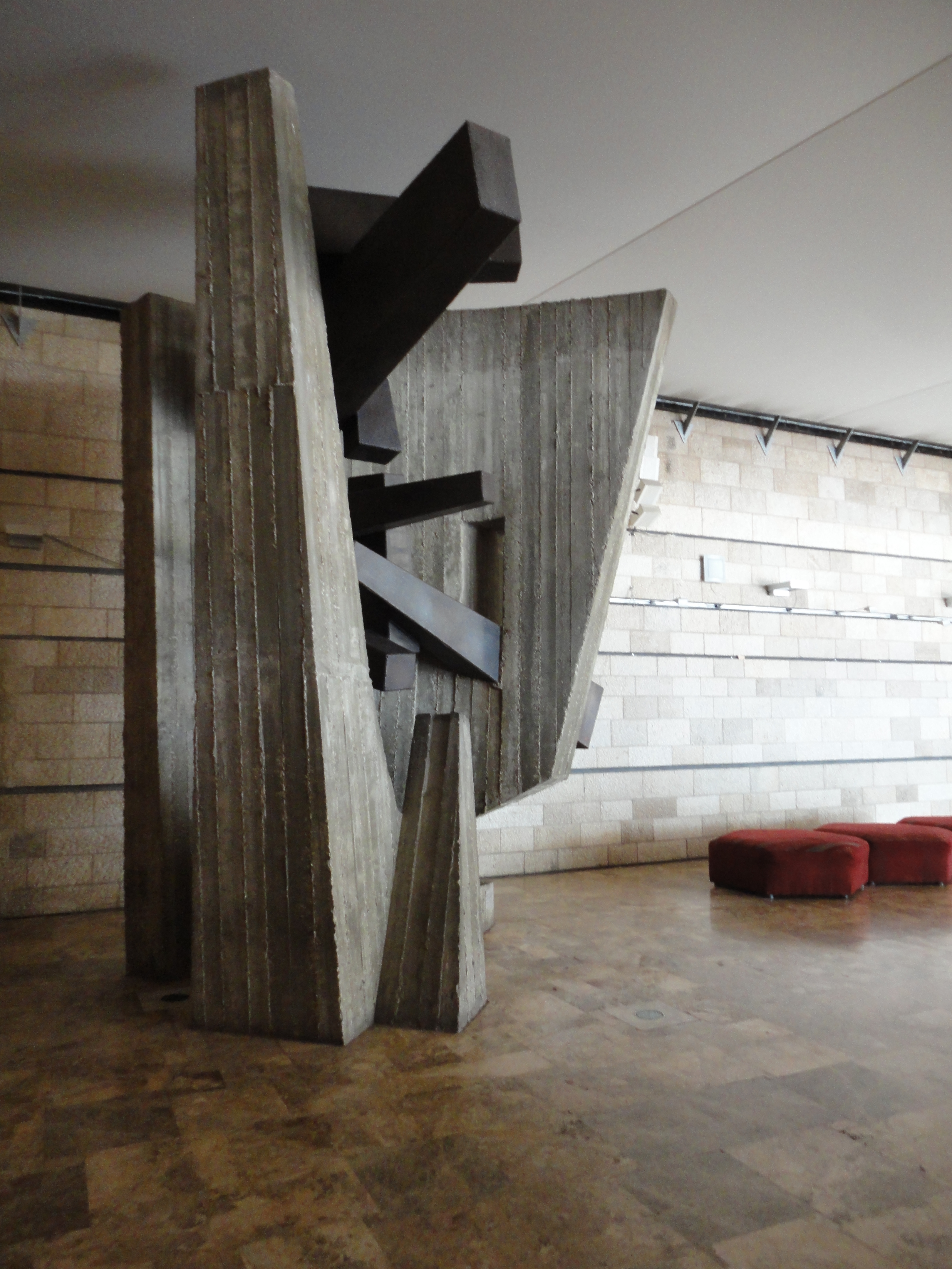 Sculpture